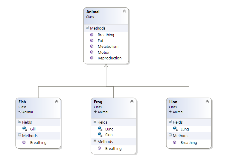 פולימורפיזם בתכנות מונחה עצמים